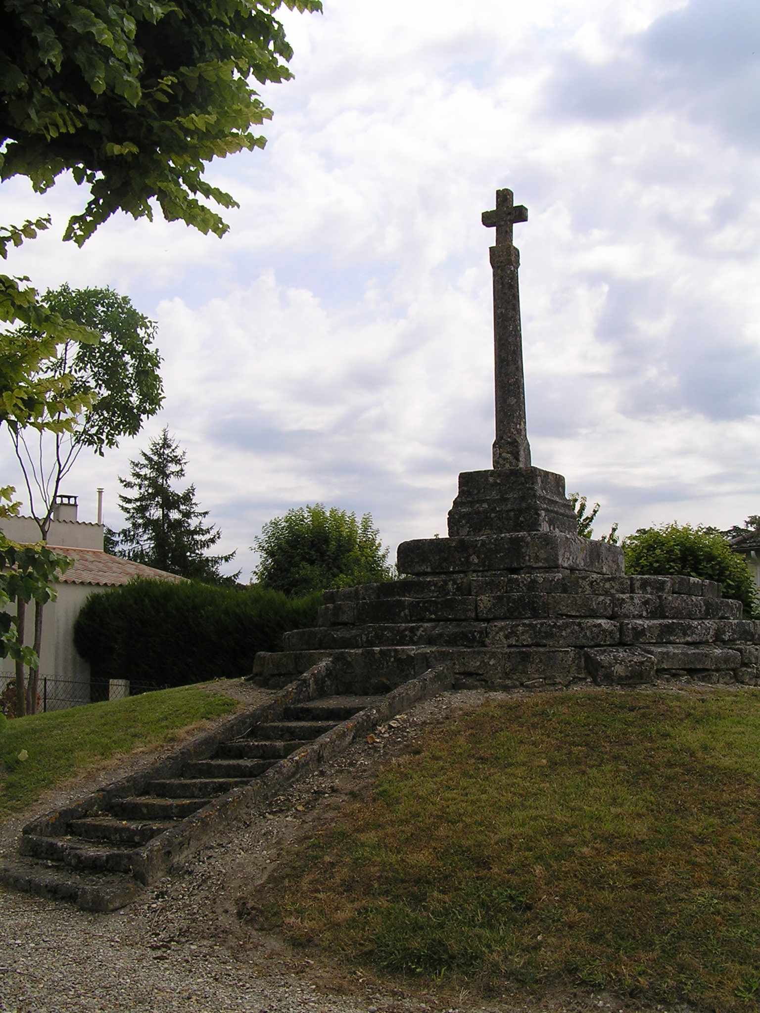 croix près de l'église de Juillac-le-coq